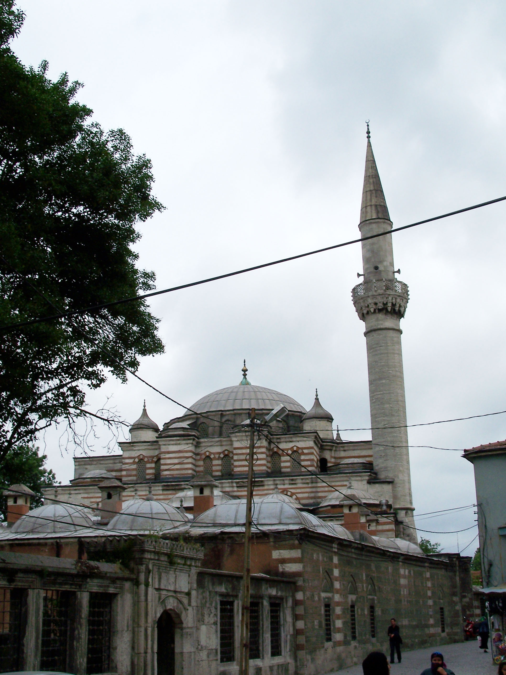 Zalmahmut Paşa Camii in Eyüp